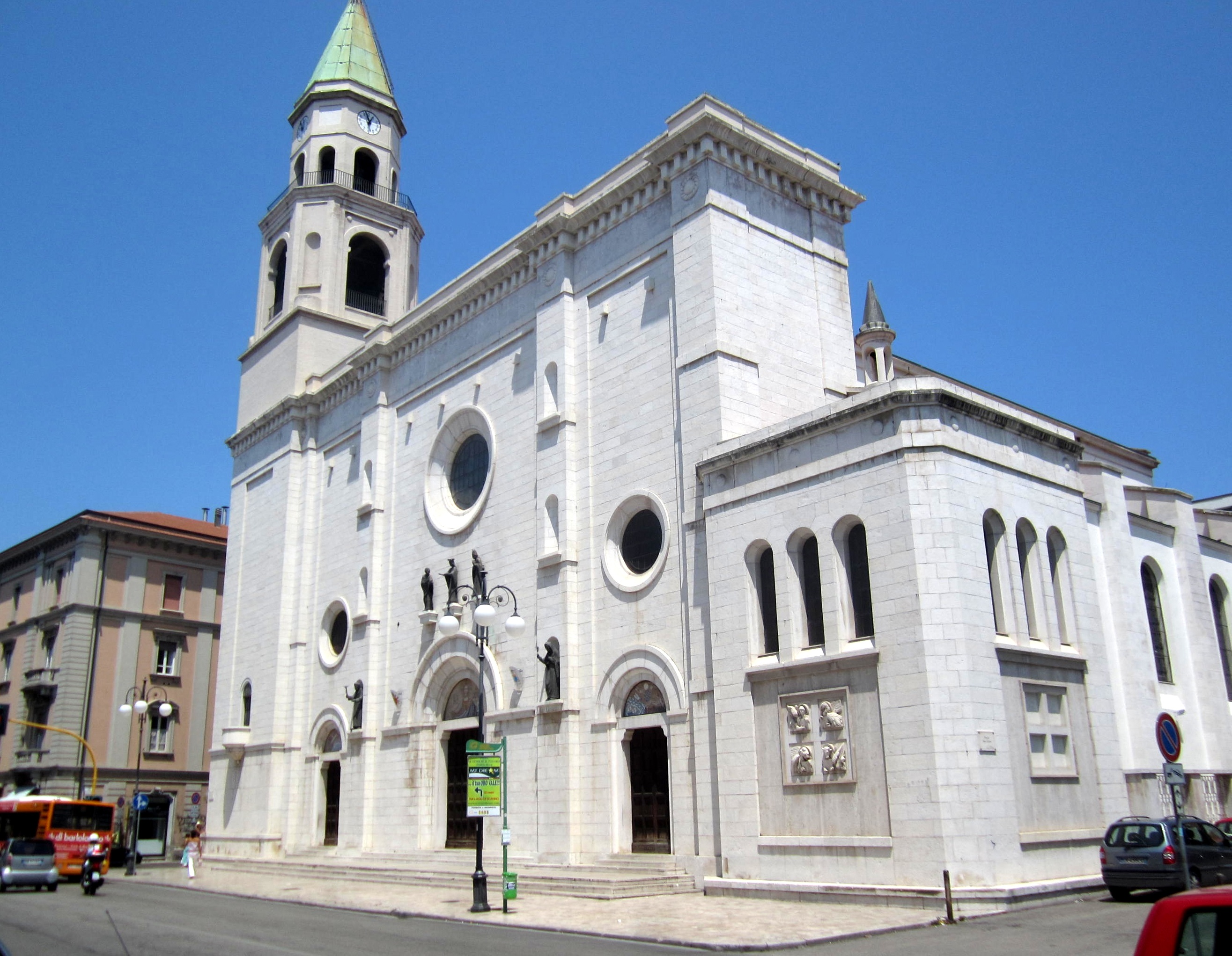 Duomo di san Cetteo a Pescara